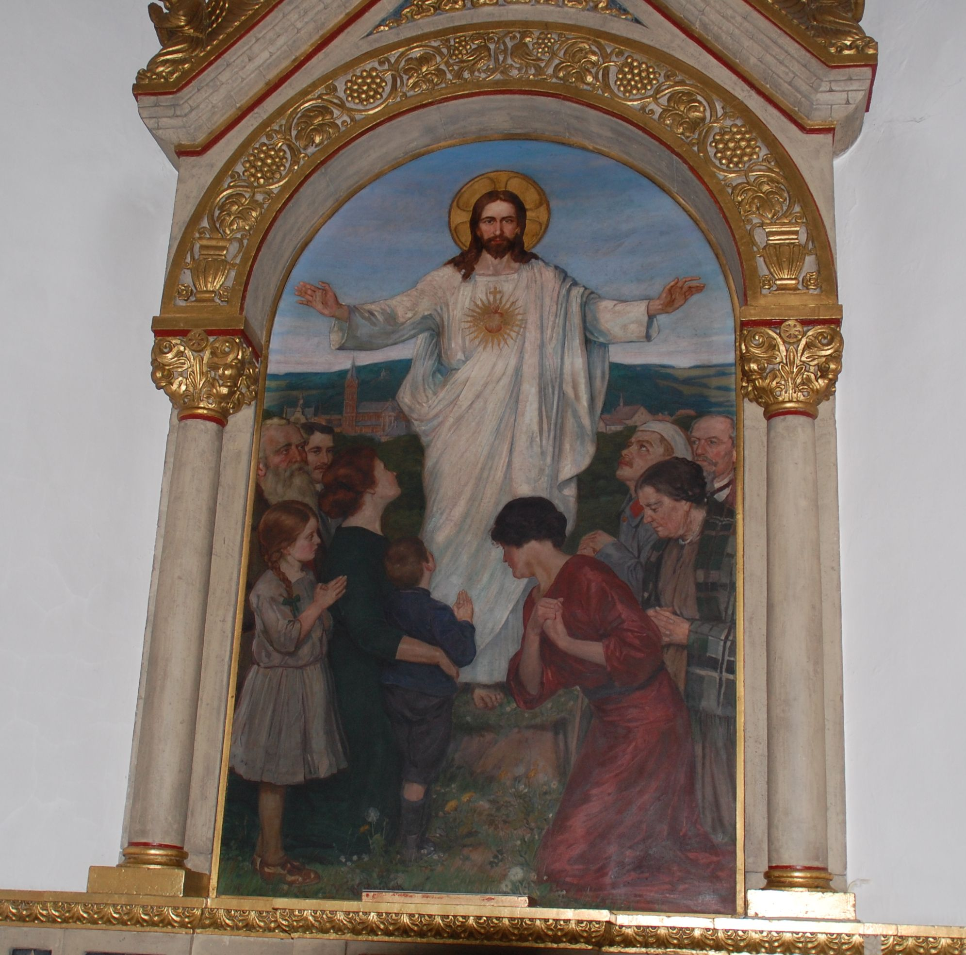 Altarbild von Wilhelm Ritterbach in der Kirche St. Johannes Baptist Neheim. Im Hintergrund Stadtansicht von Neheim